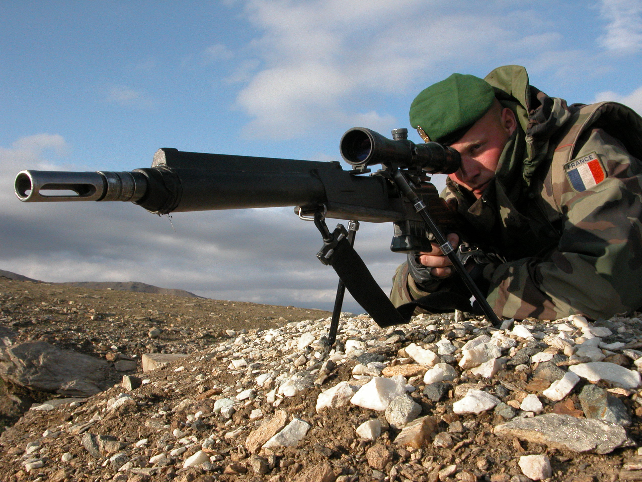 Tireur de précision du 2e Régiment étranger d'infanterie (France) en Afghanistan en 2005 avec un FR F2